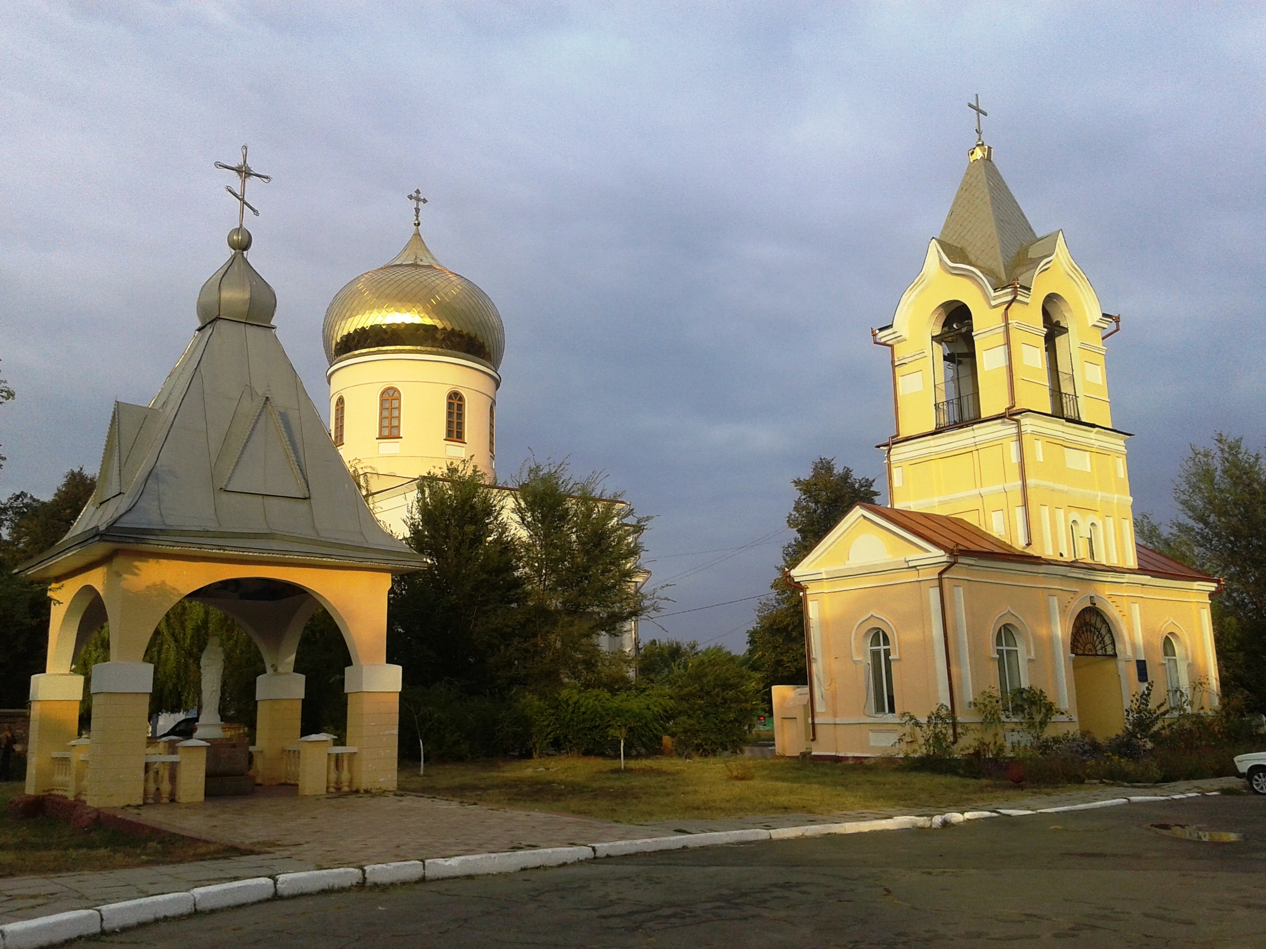 Вікіекспедиція у Буджак